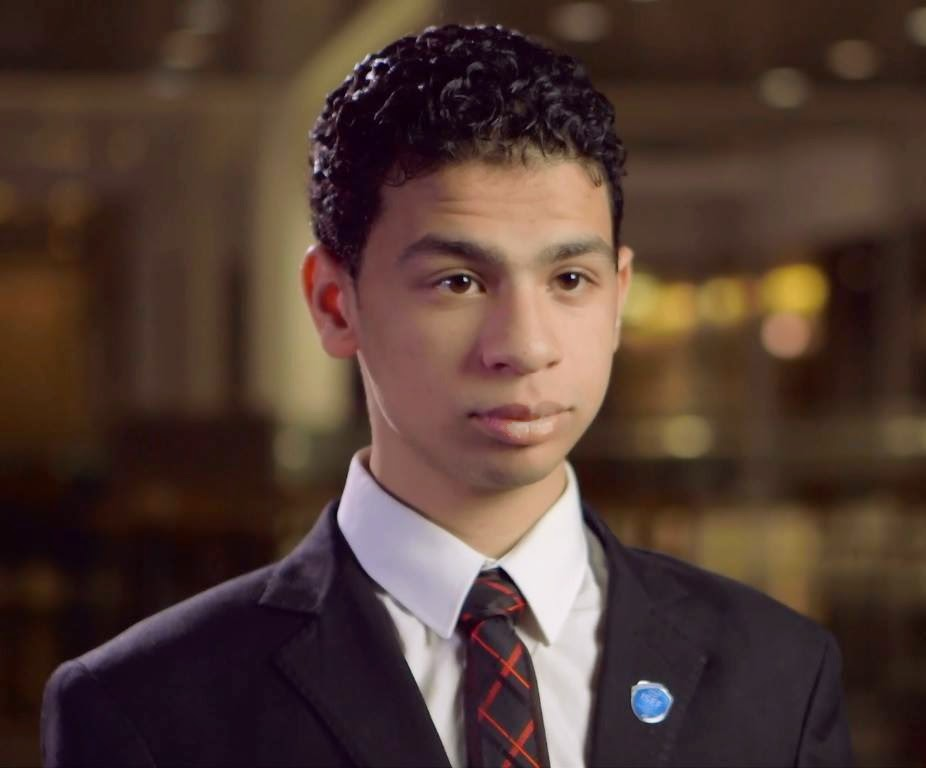 عبدالله عاصم فى حوار صحفى مع الجزيرة